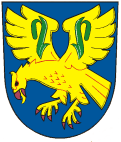 Znak obce Prosenice